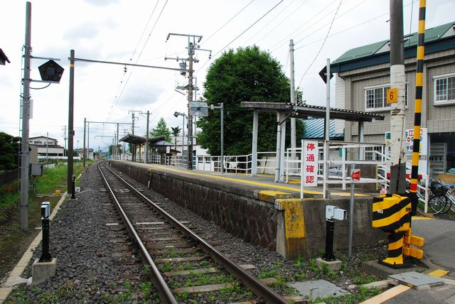 飯田線宮木駅